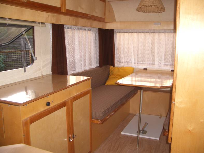 Heimstolz Weferlingen Aller 340 innen